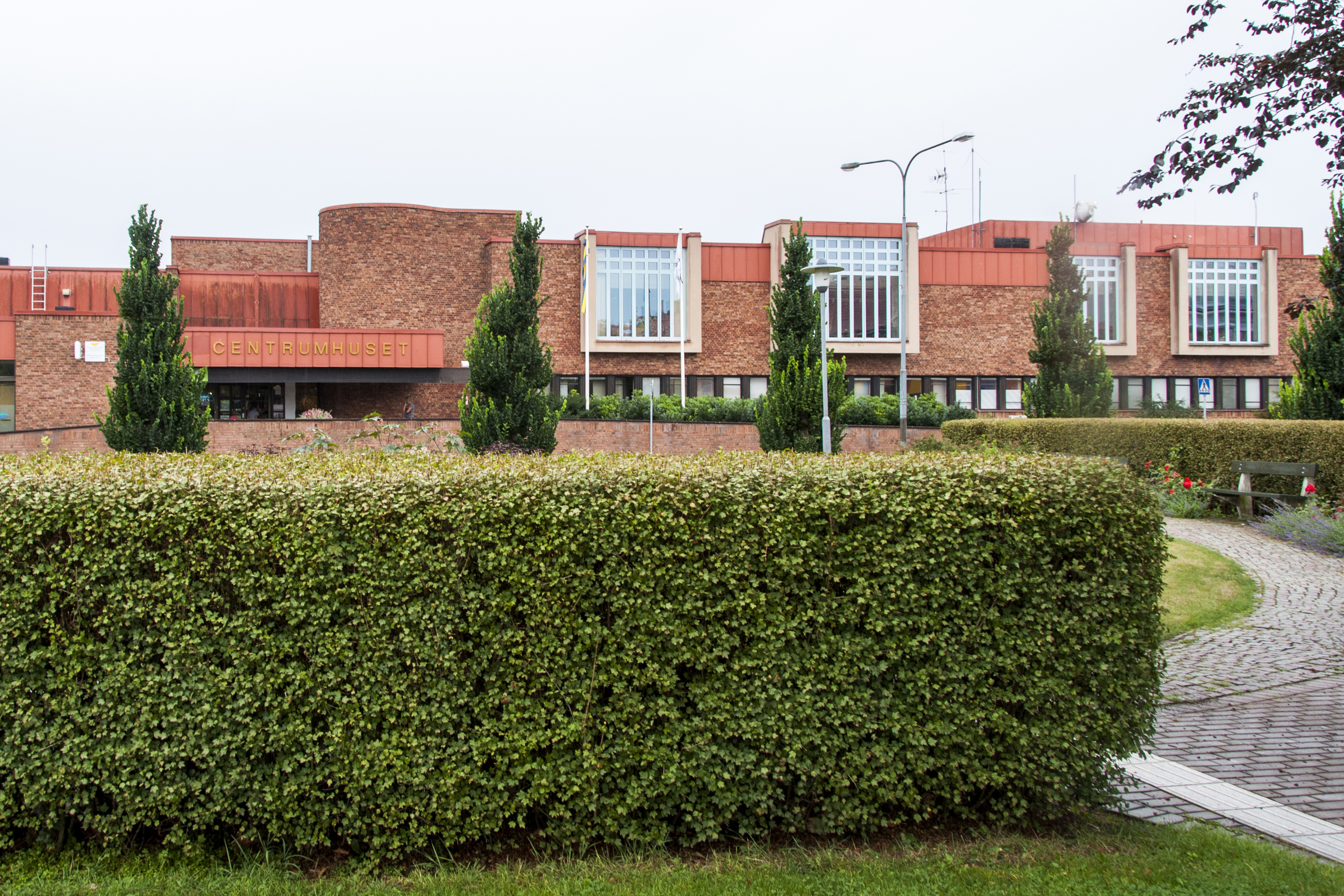 Centrumhuset i Götene. Arkitekt Hans-Erland Heineman. Byggnadsår 1974